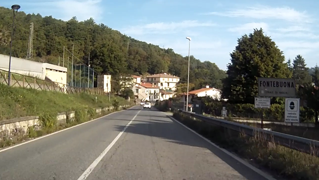 Vaglia, frazione Fontebuona